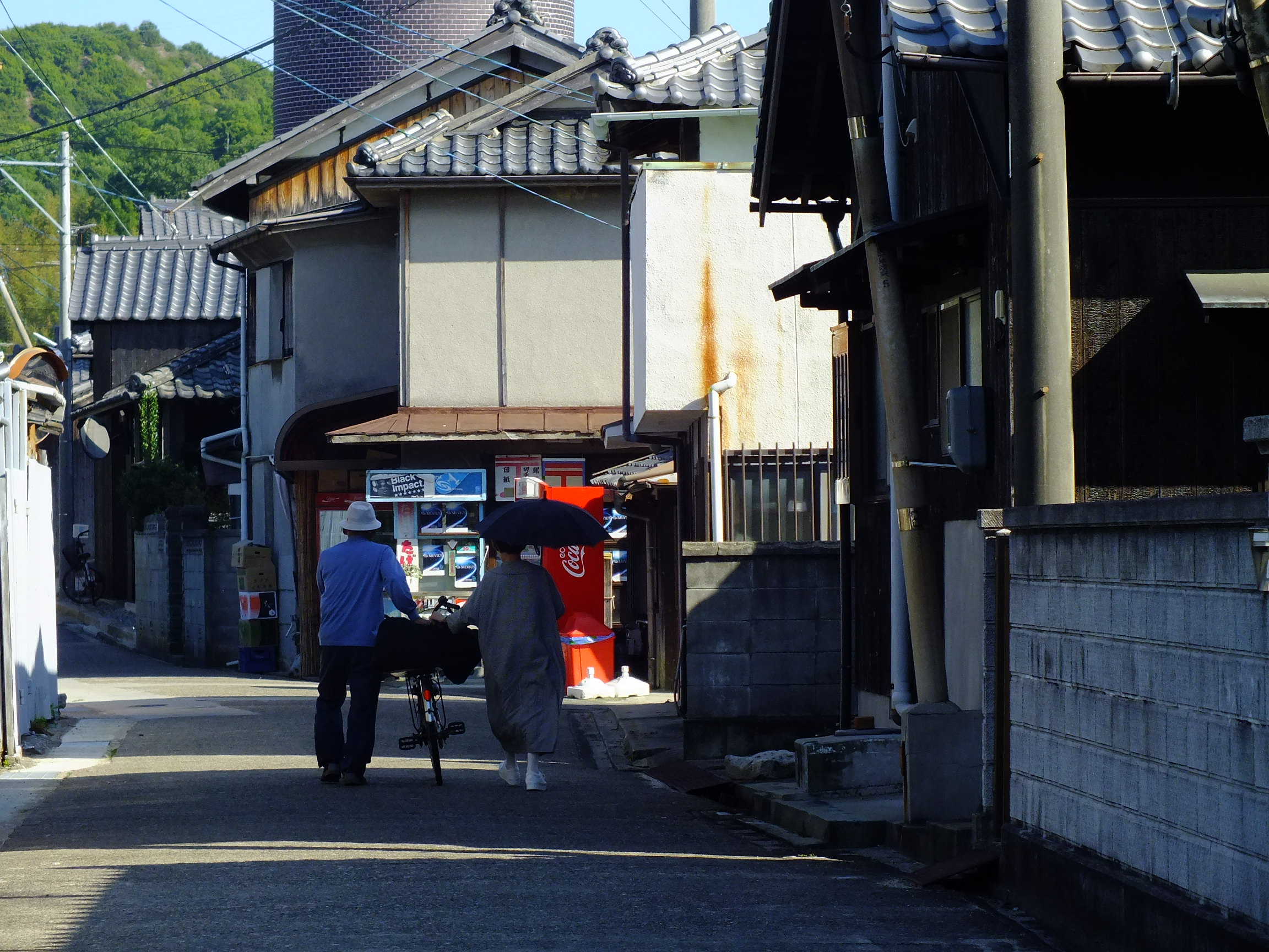 TEL: 0879-68-3555 （豊島美術館）